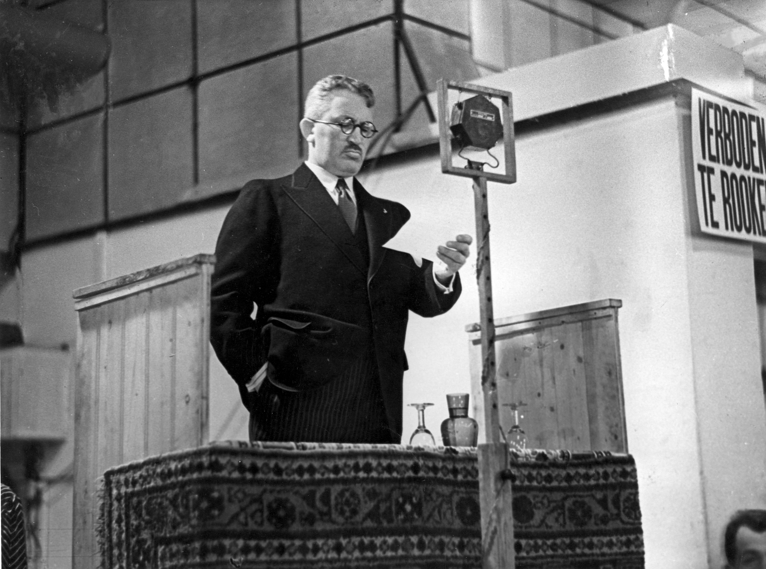 Abraham Asscher, de latere voorzitter van de Joodse Raad, tijdens zijn rede in het RAI-gebouw waar een grote protestvergadering wordt gehouden tegen de genomen maatregelen betreffende de Joden in Duitsland, Amsterdam Nederland maart 1933.